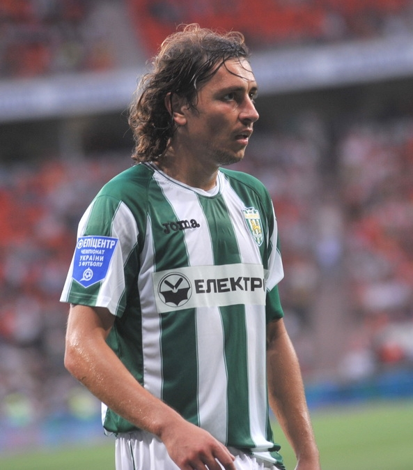 Игорь Ярославович Худобяк — украинский футболист.